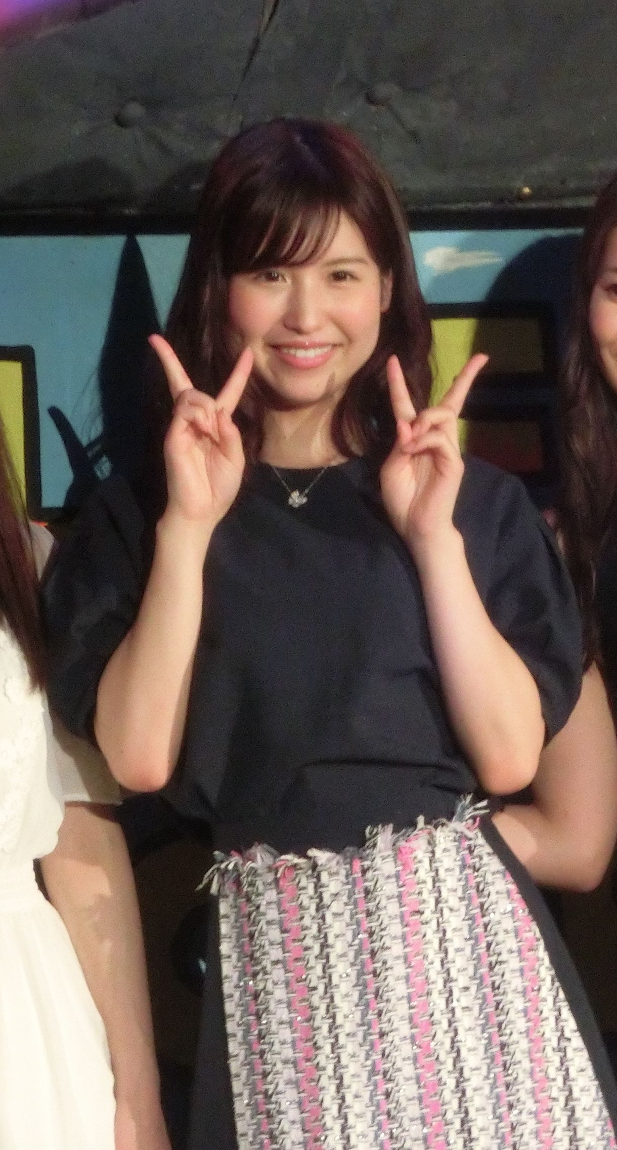 This file has been extracted from another file: KajifesCIMG3734.jpg